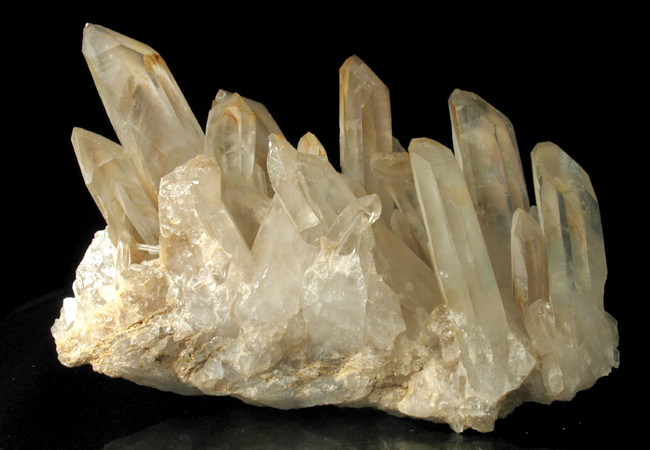 minerał; kwarc, pochodzenie Madagaskar; autor zdjęcia Stowarzyszenie Spirifer 10.07.2006r.